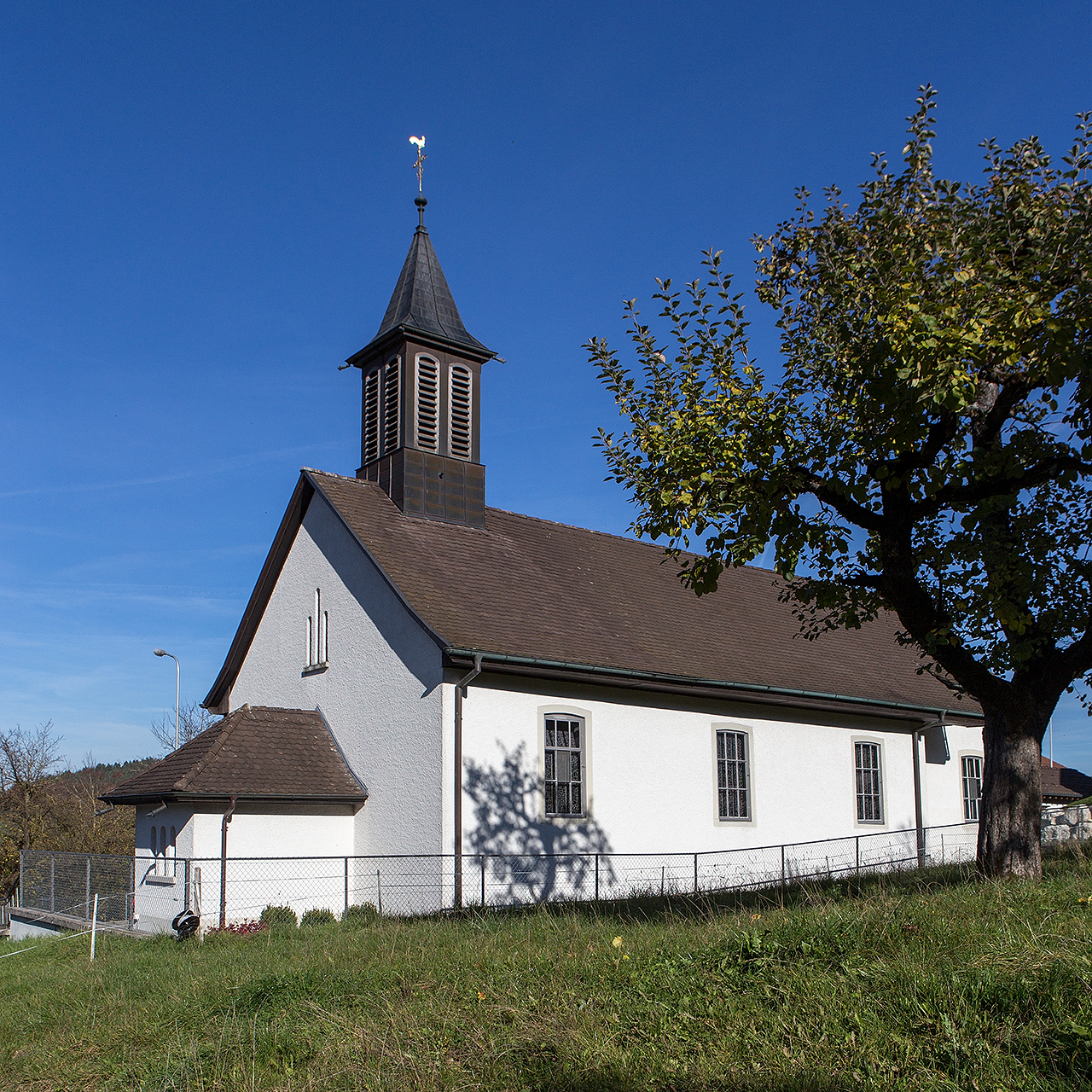 Kapüelle aus dem Jahre 1818 in Châtillon (JU)